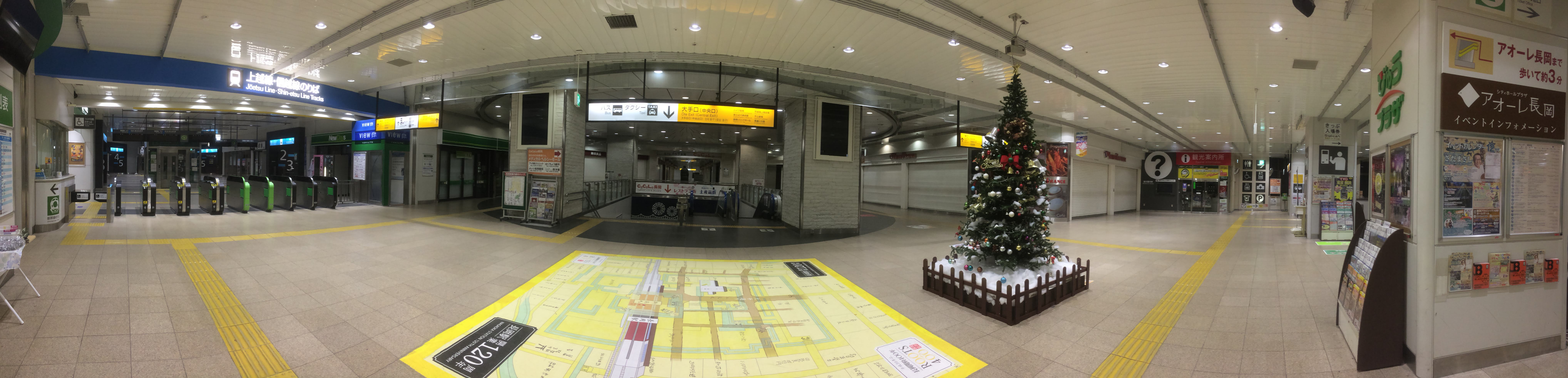 長岡駅のコンコース上（在来線改札口など）